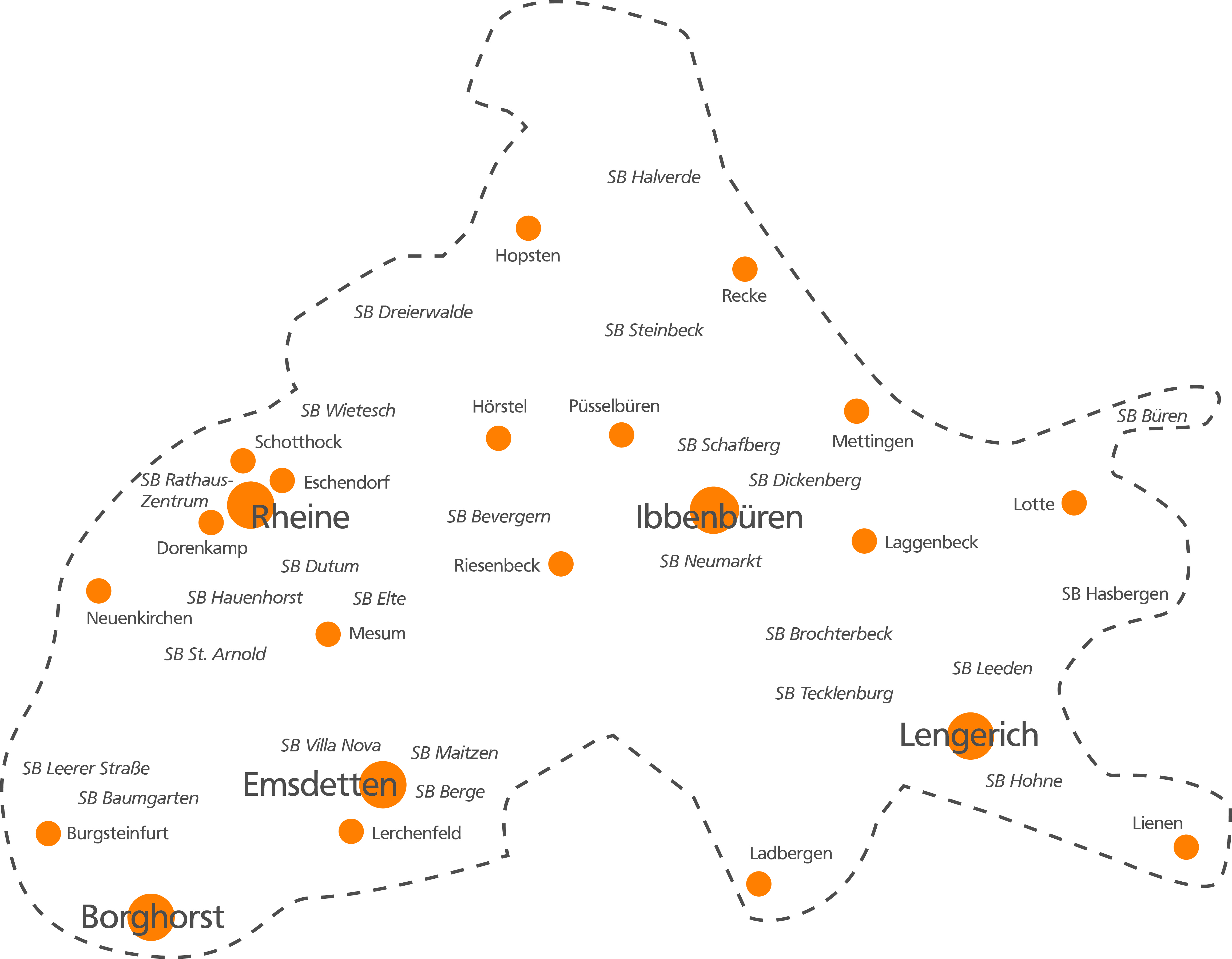 Karte mit allen Geschäftsstellen der VR-Bank Kreis Steinurt inklusive der SB-Stellen